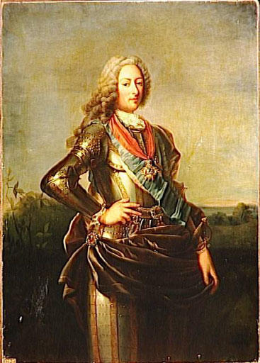 Portrait of Louis d'Orléans, Duke of Orléans (1703-1752)